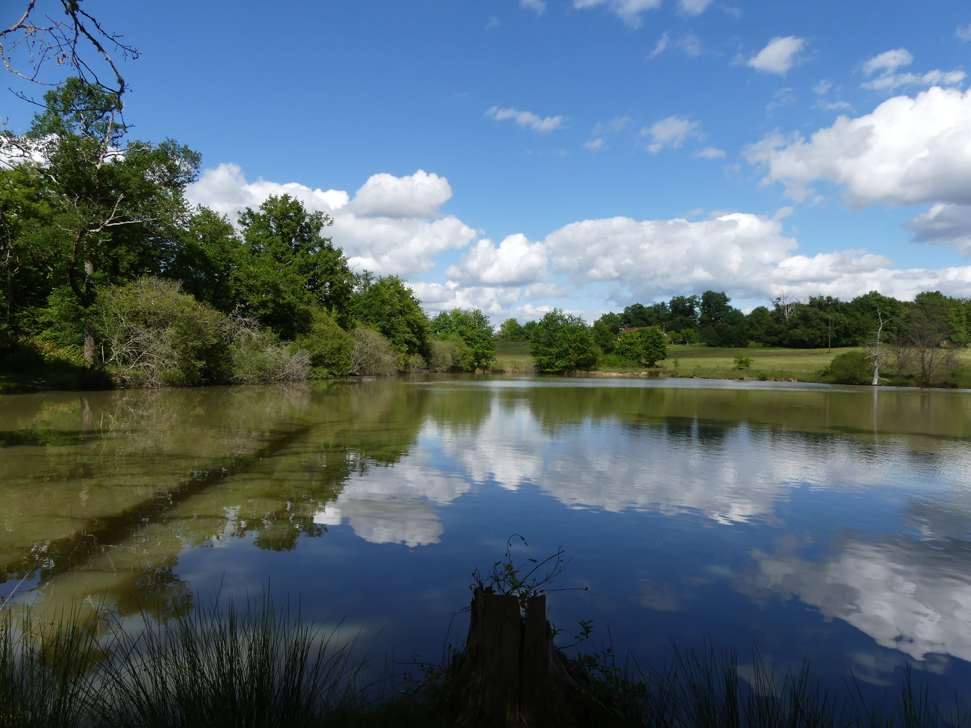 Étang près du lieu-dit Pouyoulet, Saint-André-de-Double, Dordogne, France.